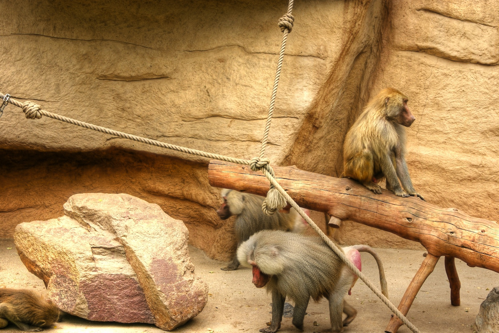 Affen auf dem Affenfelsen im Kölner Zoo.